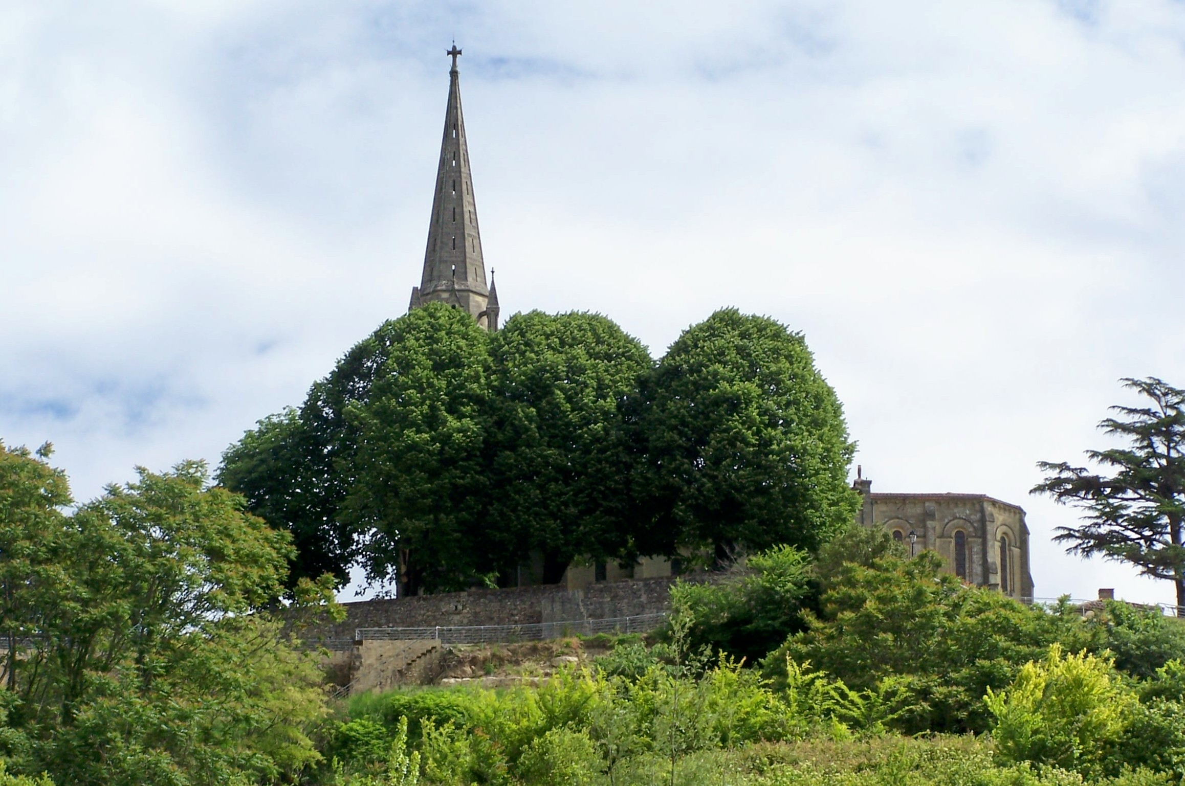 Église de Sainte-Croix-du-Mont, Gironde, France